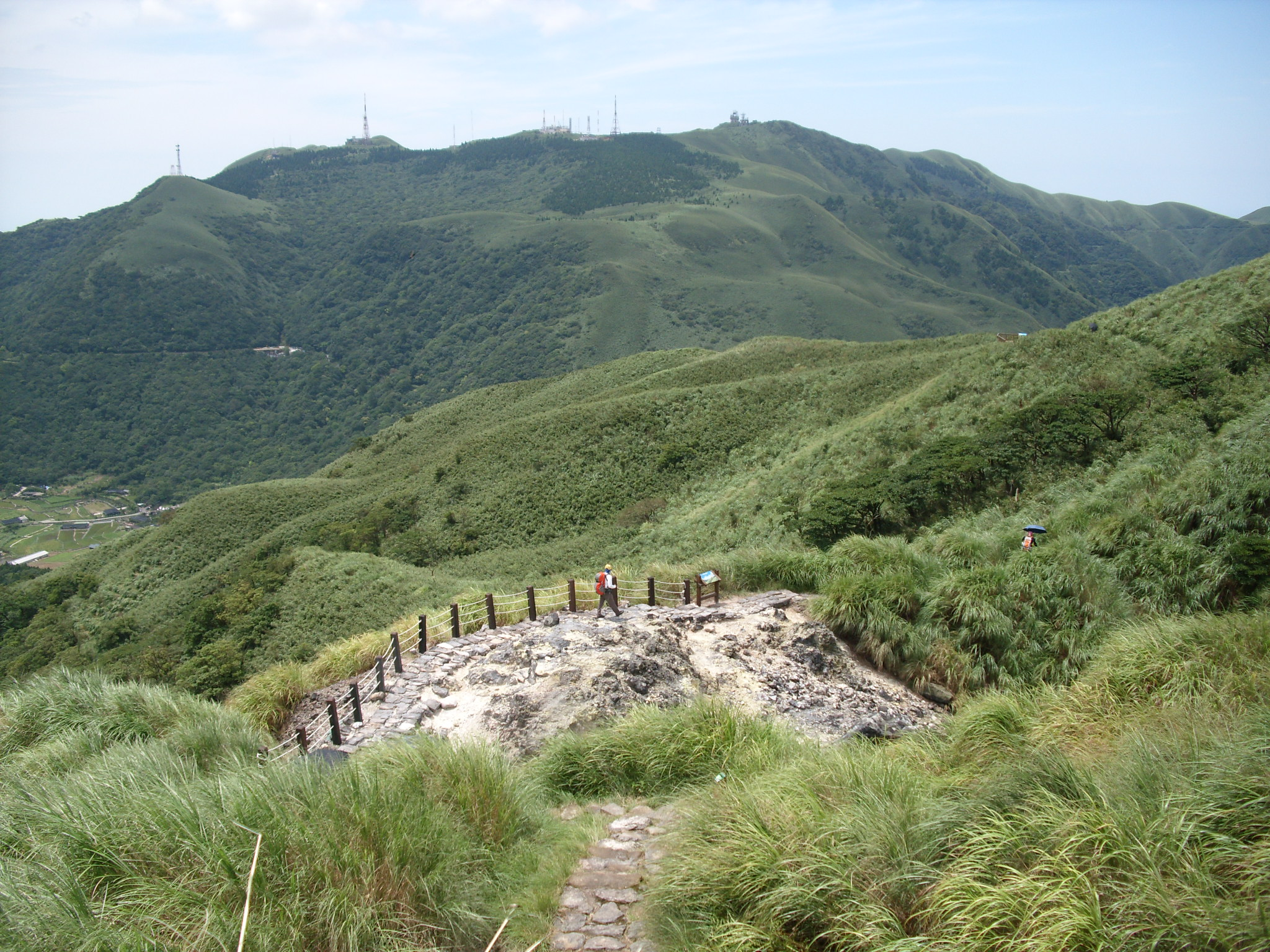 Bân-lâm-gú: 對七星山到小油坑的山路，對面看著的山是小觀音山，面頂一支一支tshāi的彼；是電視臺電波電塔。